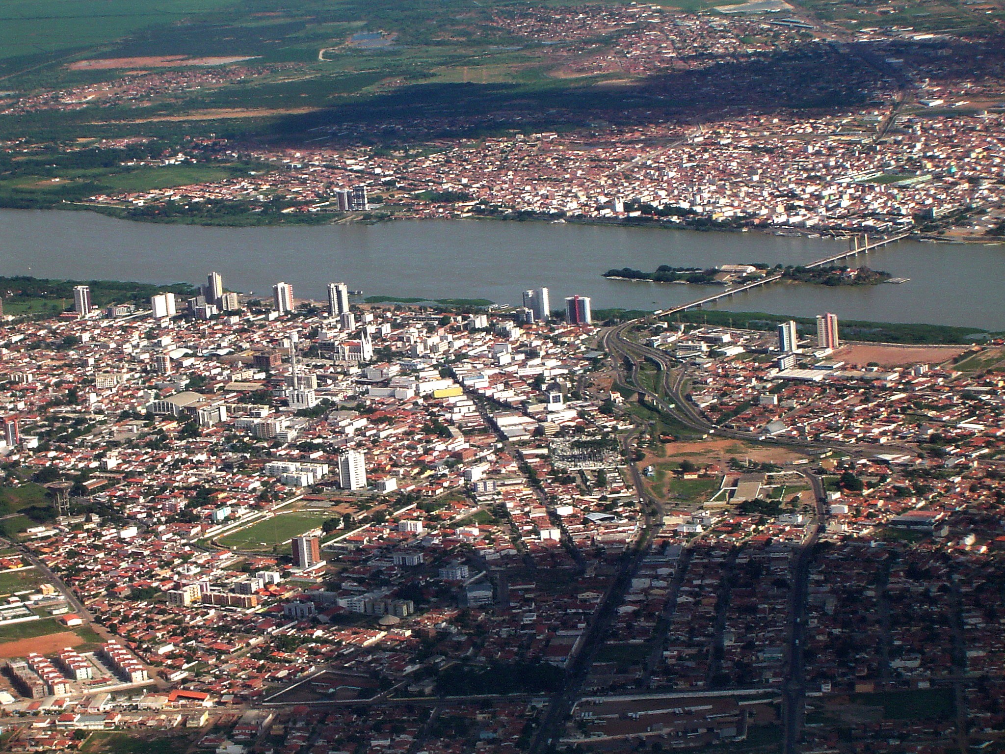 Rio São Francisco dividindo as cidades de Petrolina-Juazeiro